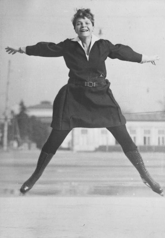 Meister des Schlittschuhes! Die ehemalige Weltmeisterin im Eiskunstlaufen Frau Jaross Szabo, Wien, bei der Ausübung einer ihrer hervorragenden Sprünge auf dem Eise.